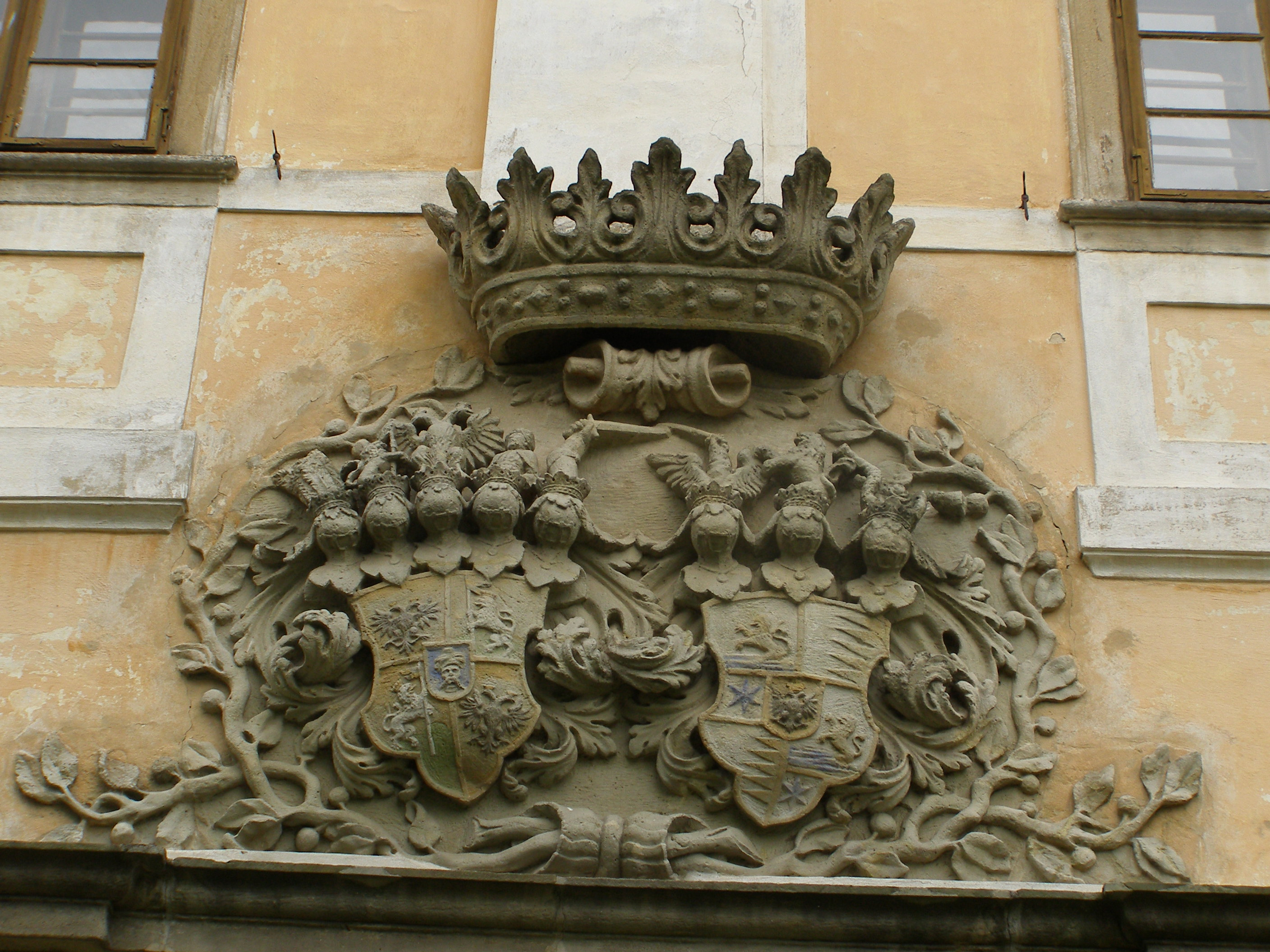 Zámek Lysá nad Labem, Zámecká 1/21, Lysá nad Labem